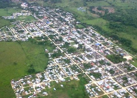 Panoramica